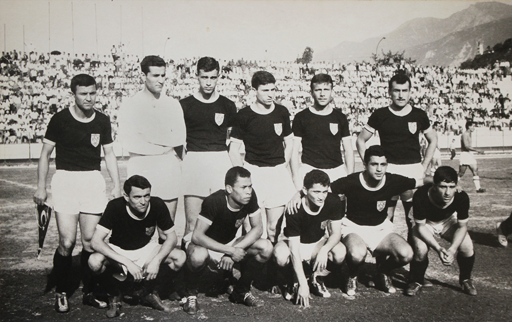 beyogluspor baraj 1961-1962